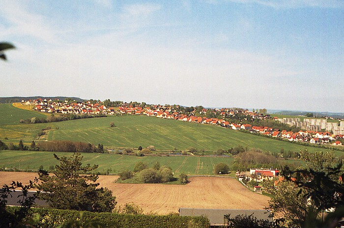 Deutschland, Thüringen, Ilm-Kreis, Ilmenau, Ortsteil Oberpörlitz, Blick vom Lärcheneck